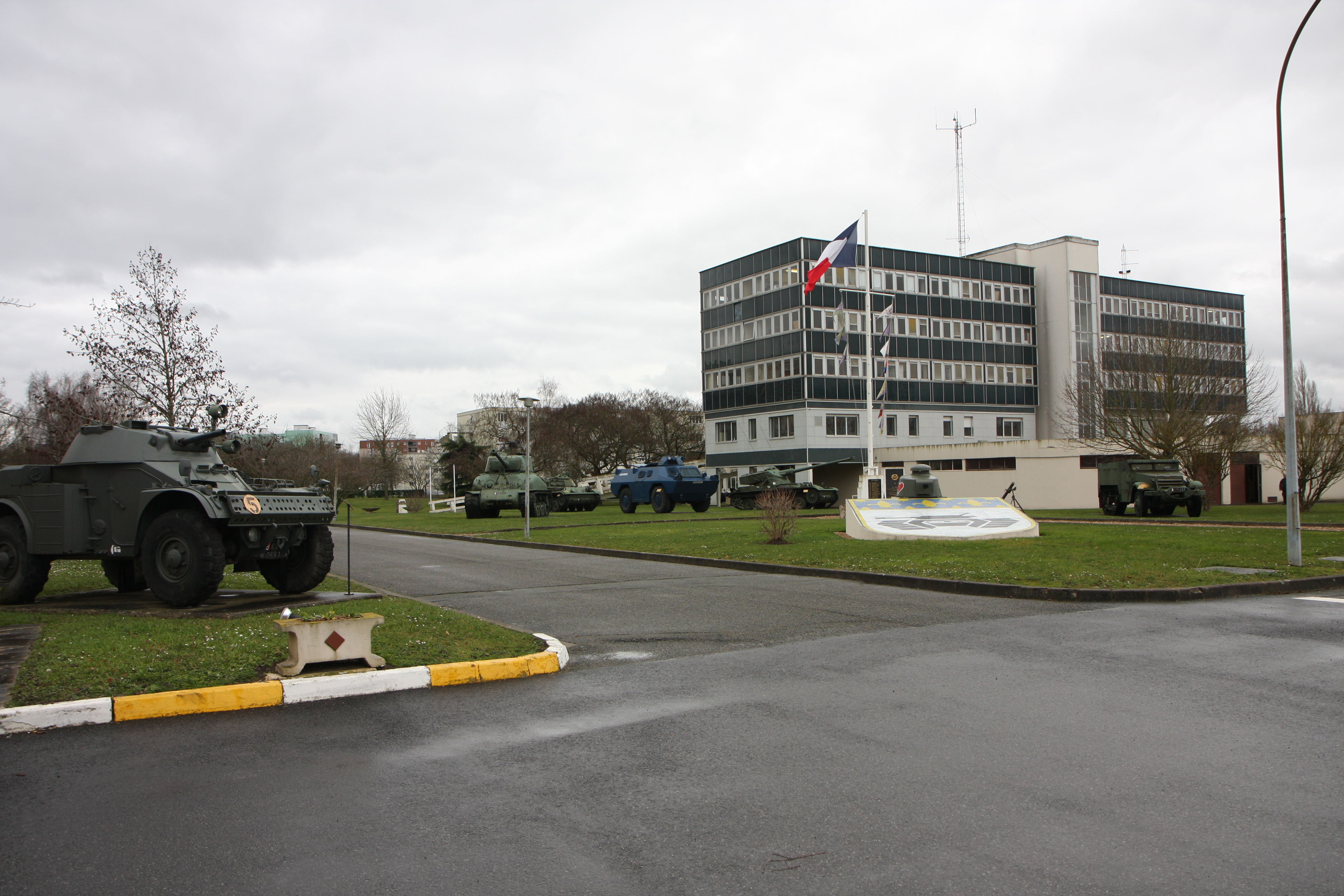 EM GBGM et véhicules anciens à Satory